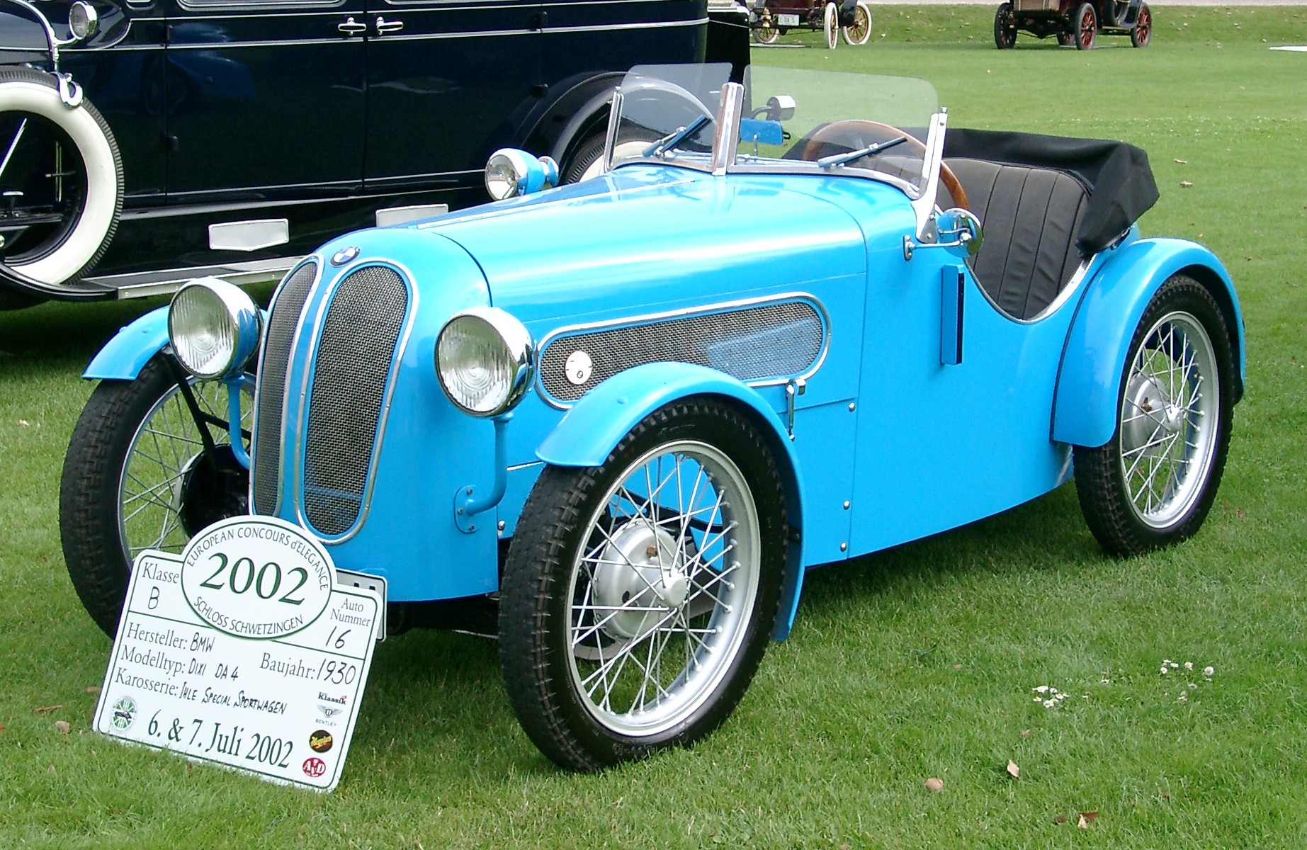 BMW Dixi DA 4, Baujahr 1930. Fotografiert anläßlich des European Concours d'Elegance 2002 in Schwetzingen